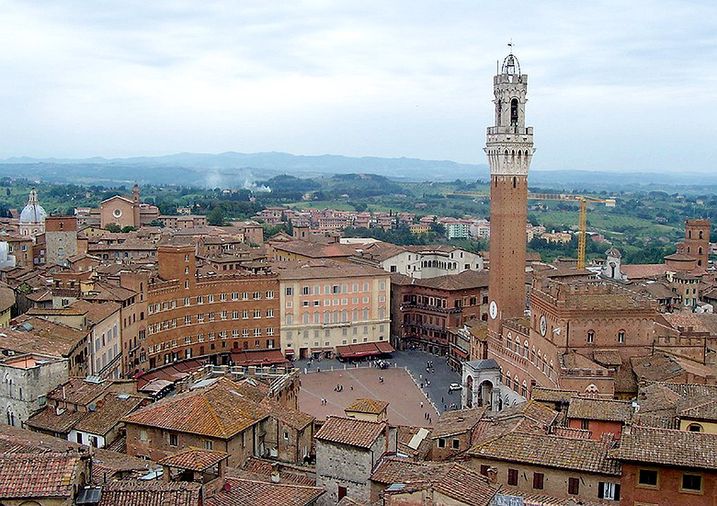 Siena - Piazza del Campo vista dal Facciatone